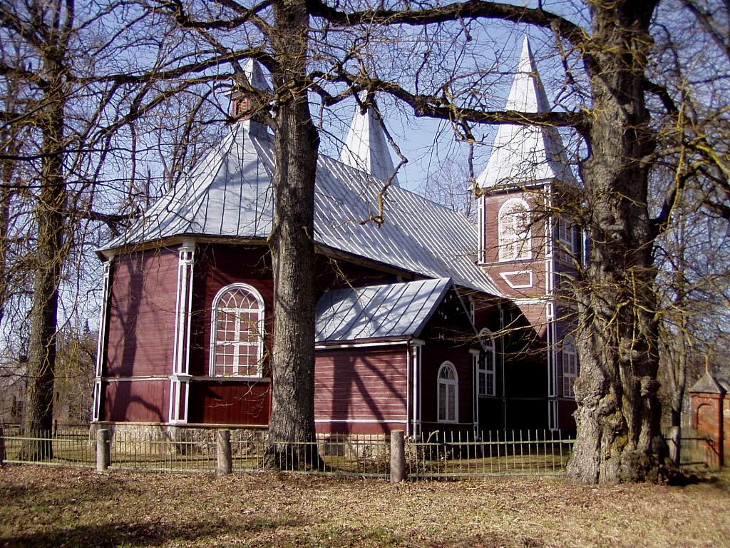 Brunavas katoļu baznīca 2007-03-24